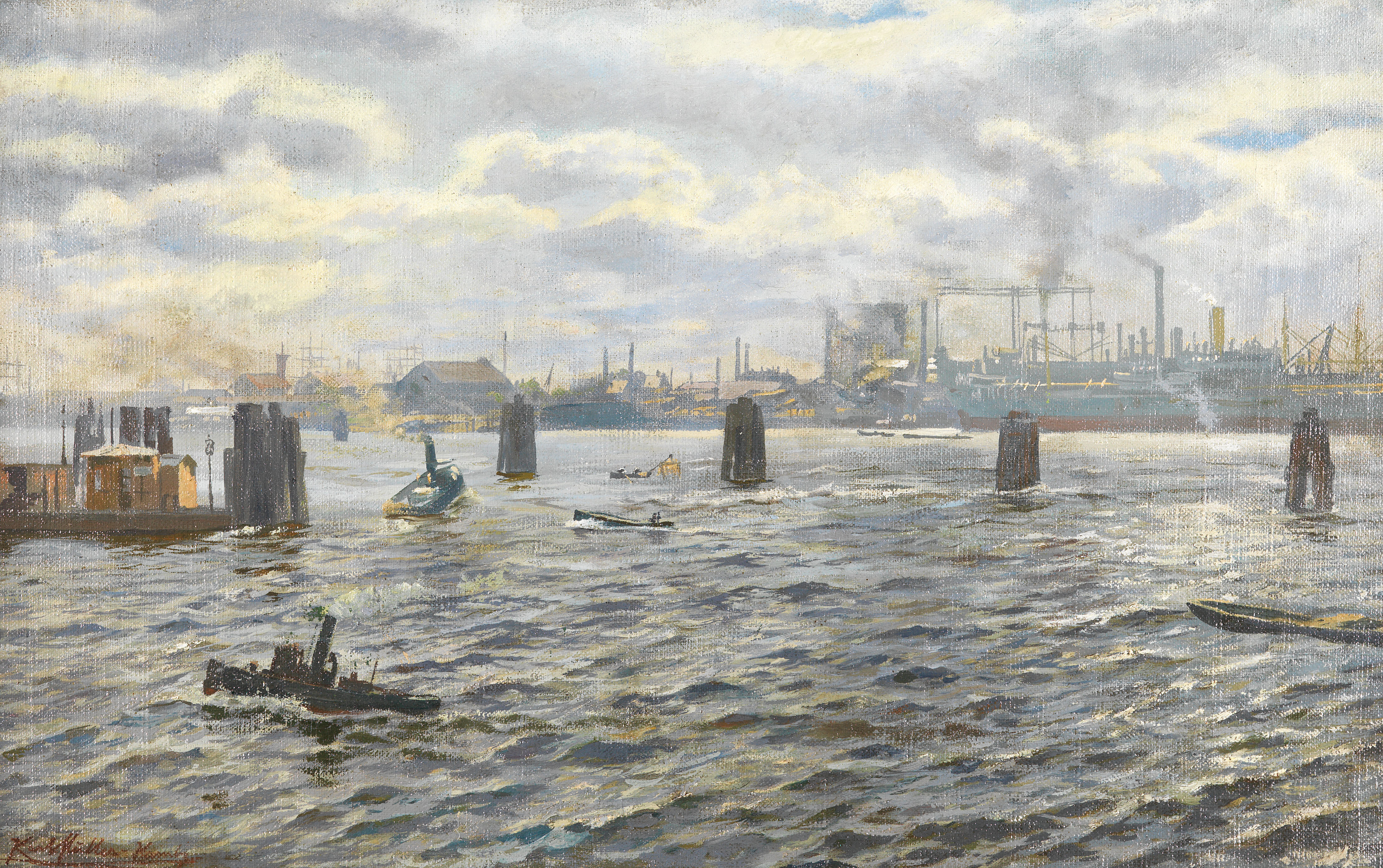 Hamburger Hafen, Öl auf Leinwand 75 x 45,5 cm (29,5 x 17,9 in)